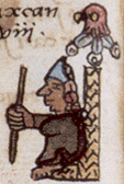 Antonio Valeriano in Aztec style